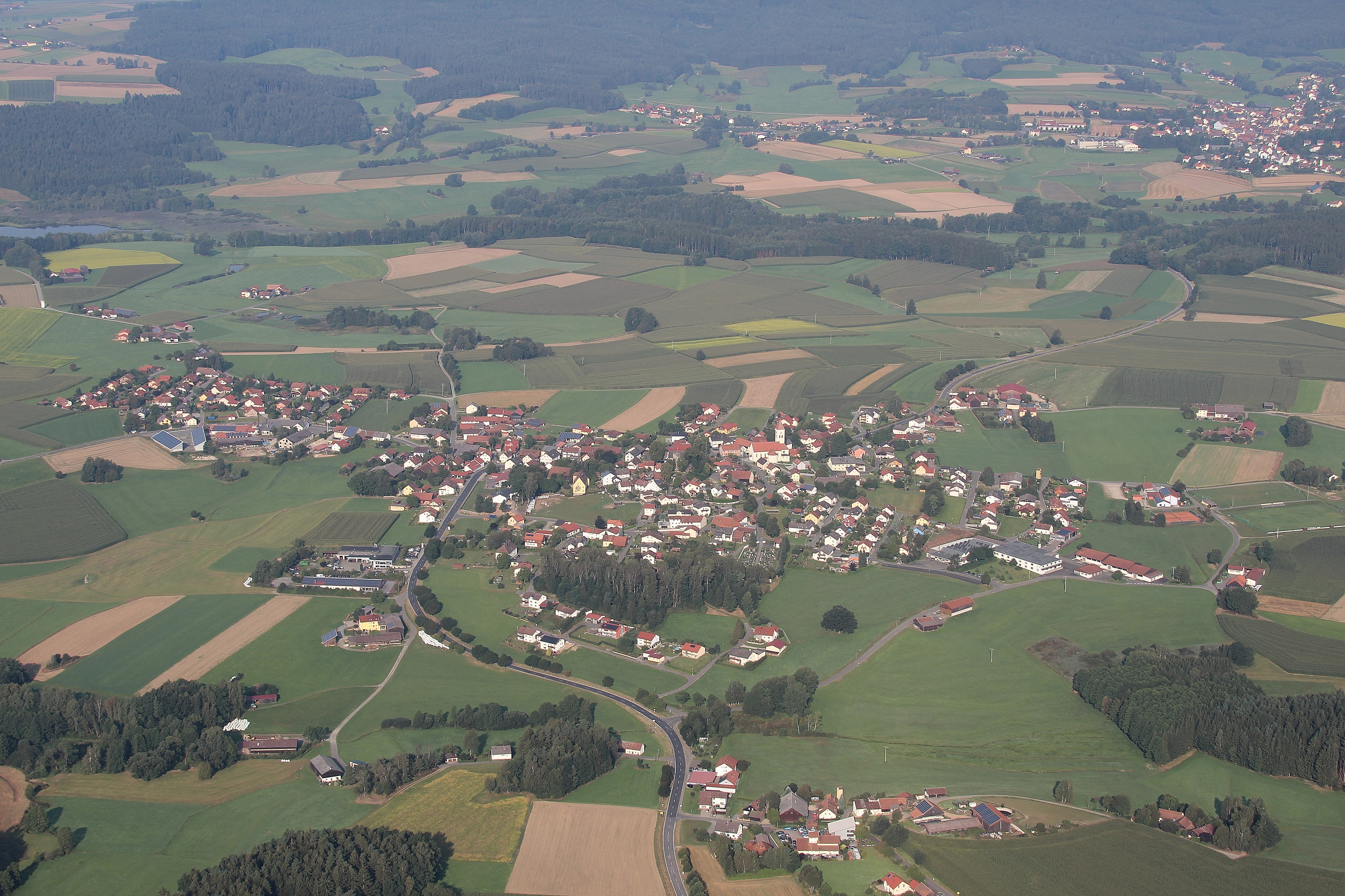 Treffelstein, Landkreis Cham, Oberpfalz, Bayern